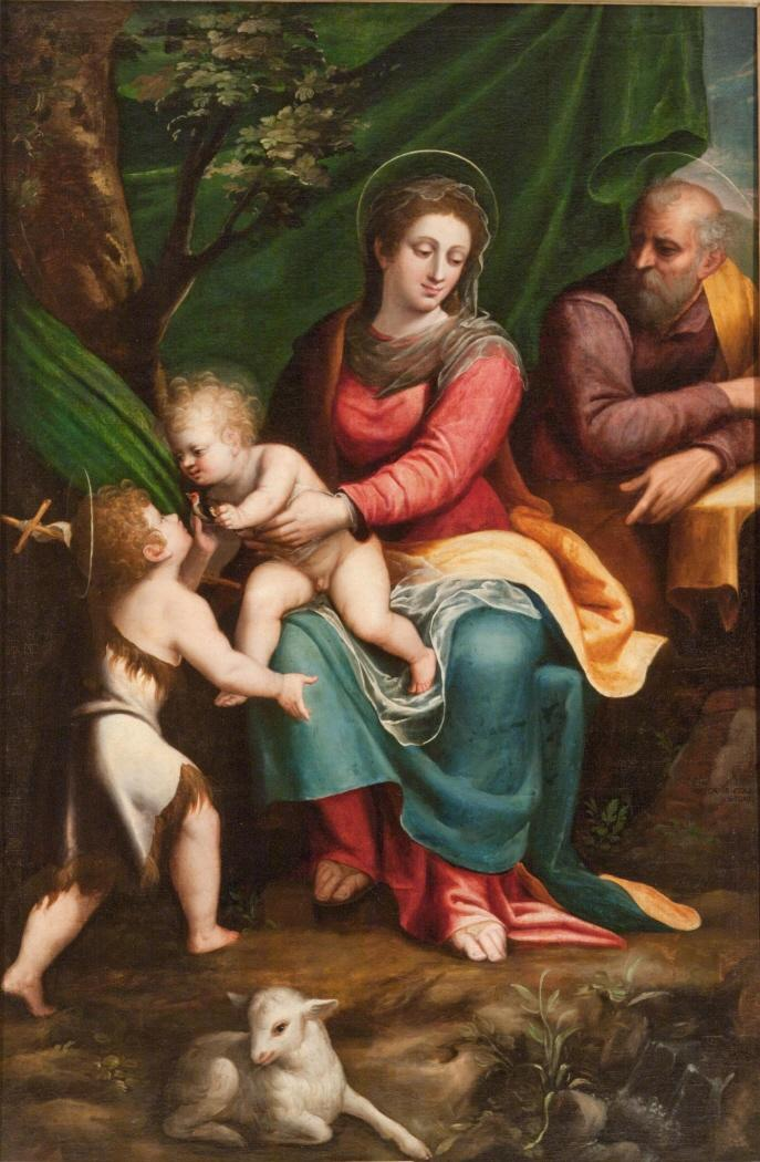 La obra representa a la Sagrada Familia cristiana junto al pequeño San Juan Bautista. Firmado "Caesar eta Alexandre Semino". Procedente de la colección de Manuel Godoy que lo sacó de la iglesia de San Pascual de Madrid. Ingresado en la Academia en 1816. Antigua atribución a Luca Cambiasso.